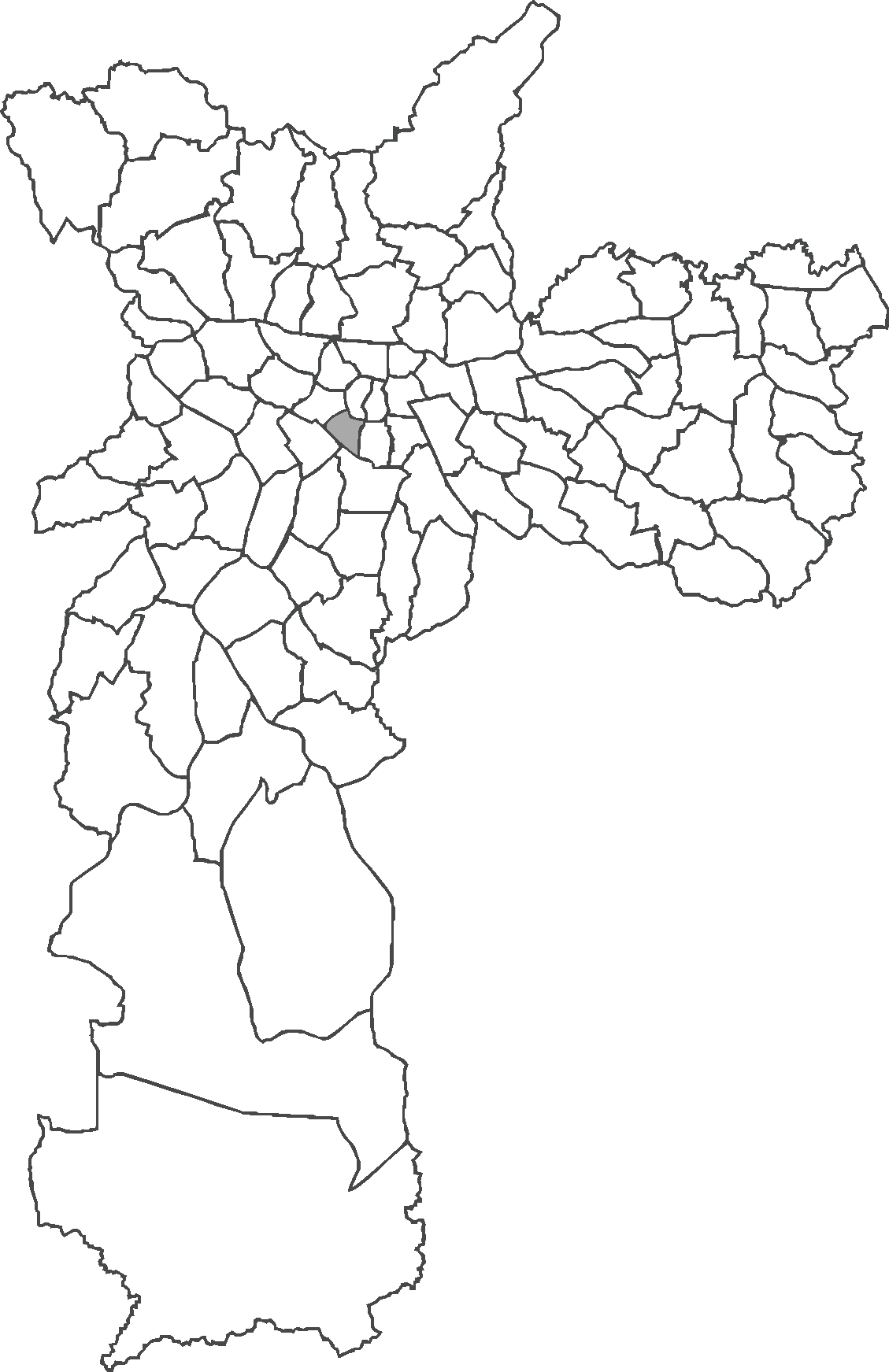 Localização do distrito da Bela Vista no município de São Paulo.